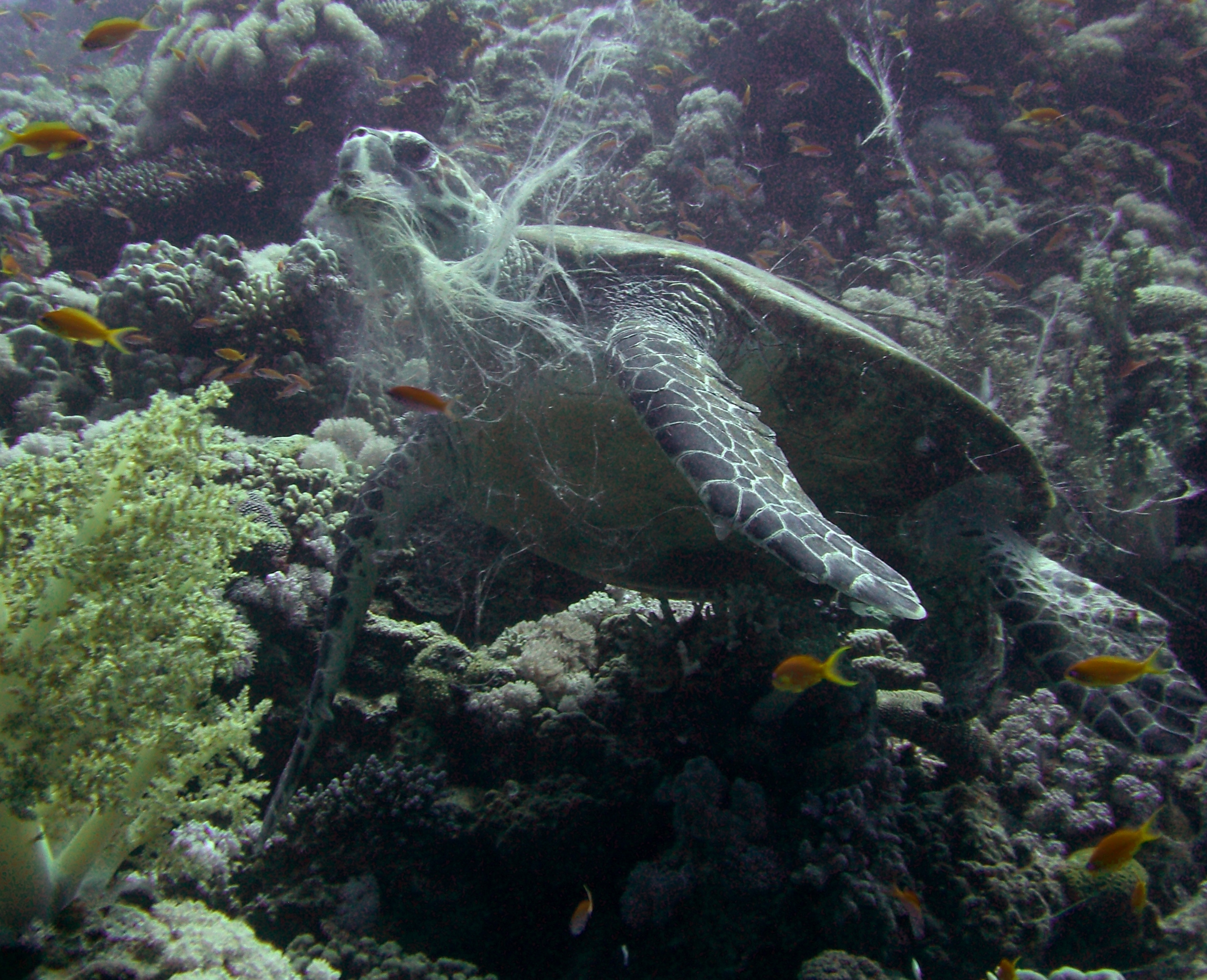 Eretmochelys imbricata